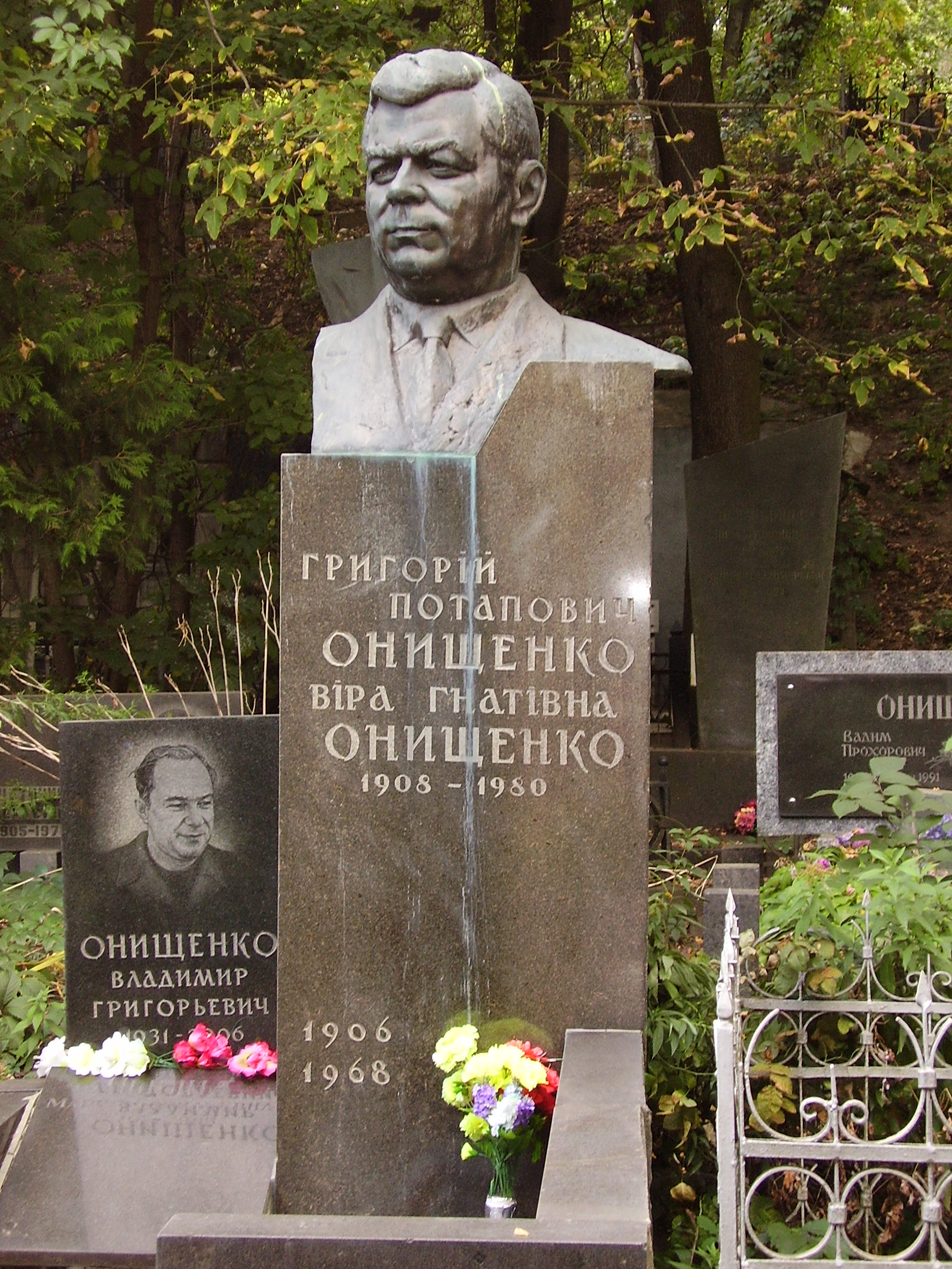 Могила Онищенка Г. П., уповноваженого військової Ради армії в Другій світовій війні, Київ, Байкова вул., 6, діл. 7